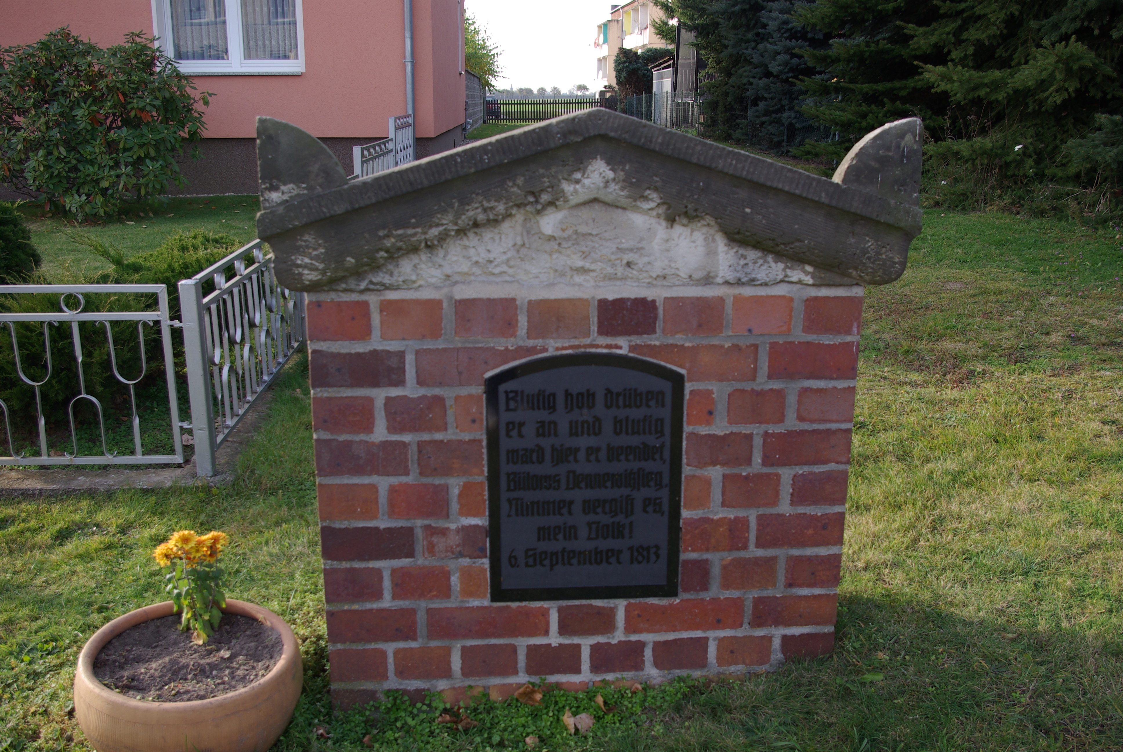 Niedergörsdorf in Brandenburg. Der Denkstein an der Jüterboger Straße gedenket der Schlacht bei Dennewitz am 6. September 1813.